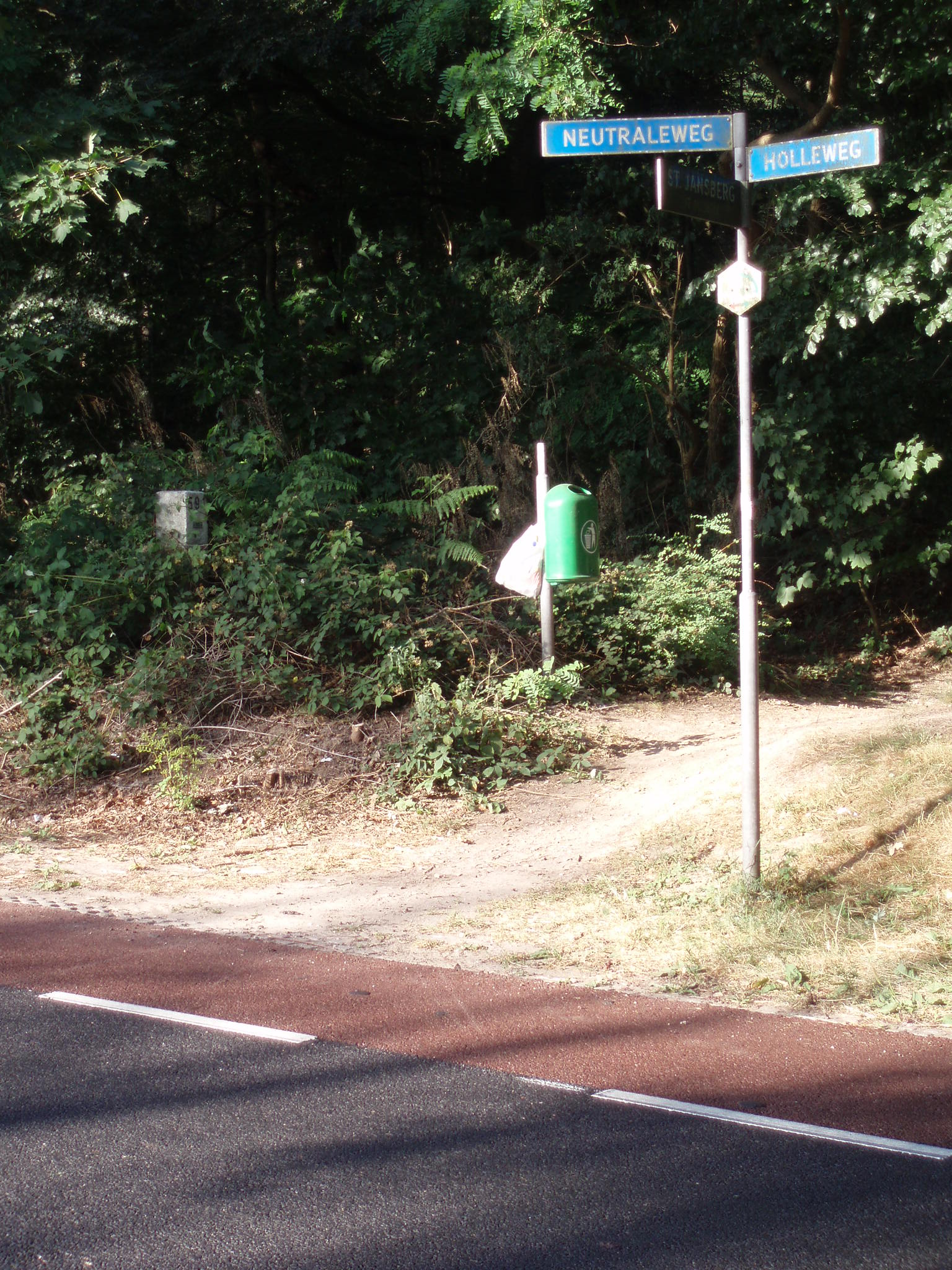 eigen foto 2006 (c) looi